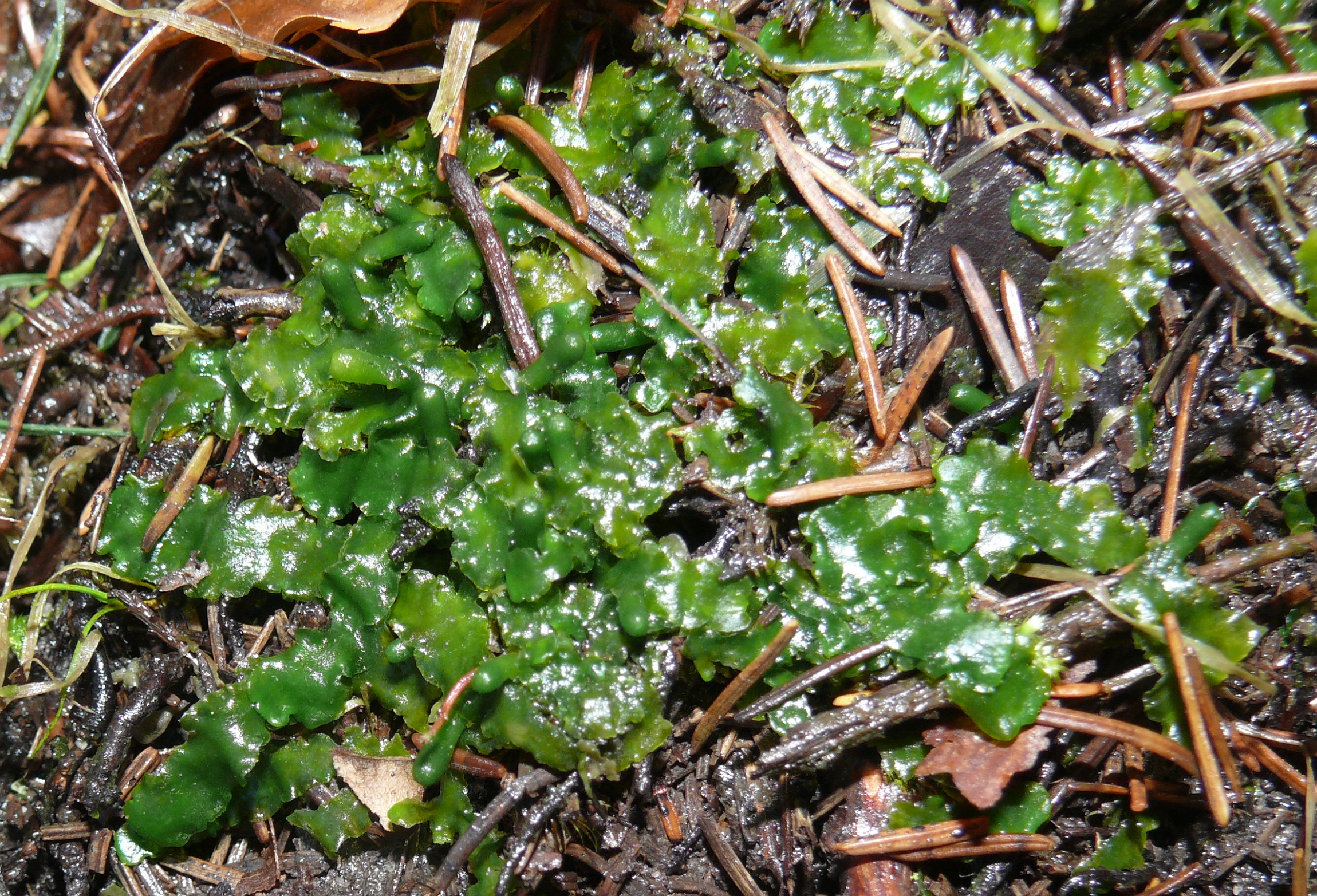 Aneura pinguis, Schwäbisch-Fränkischer Wald, Germany